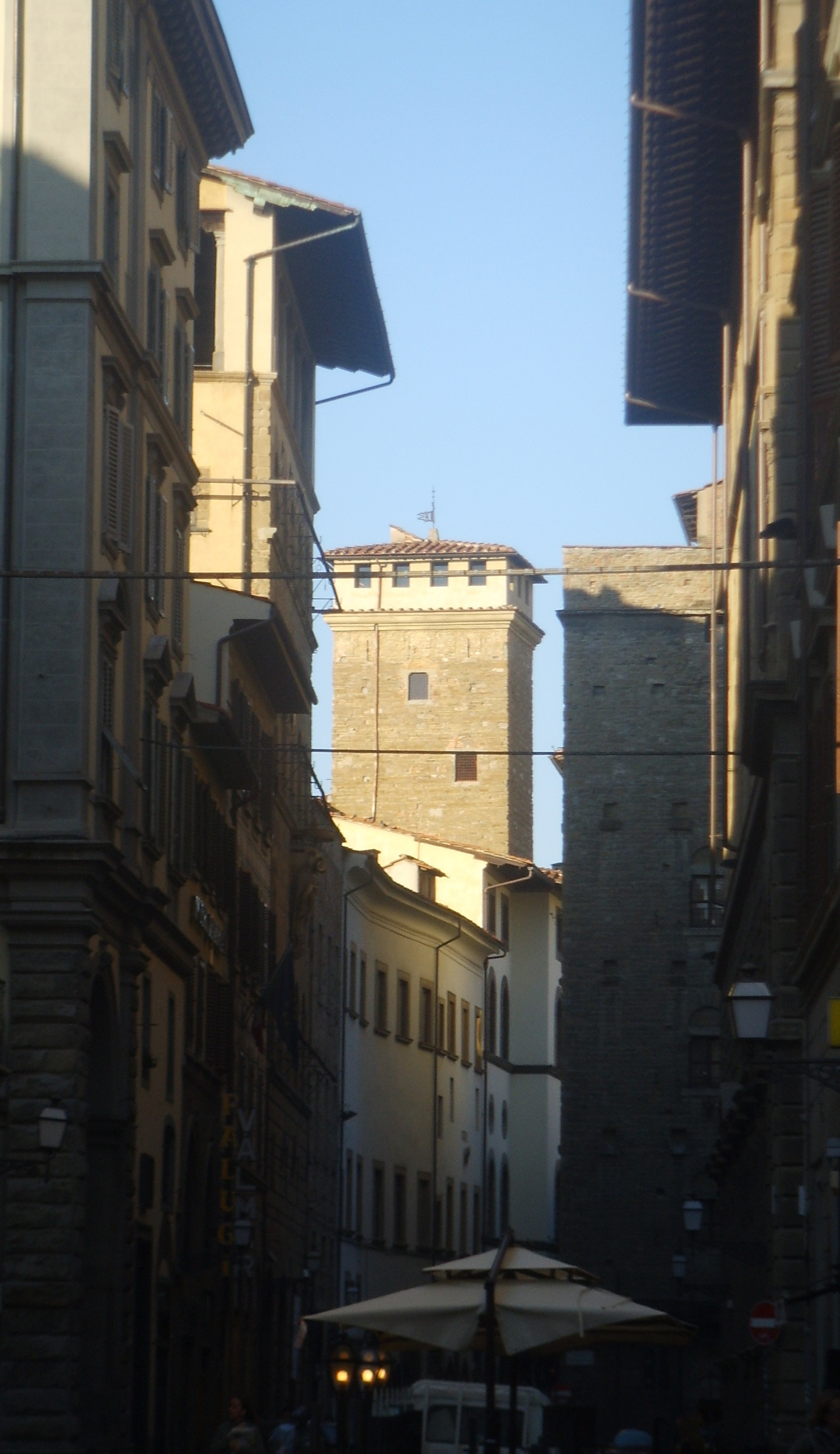 Torre_dei Monaldi in Florence, italy